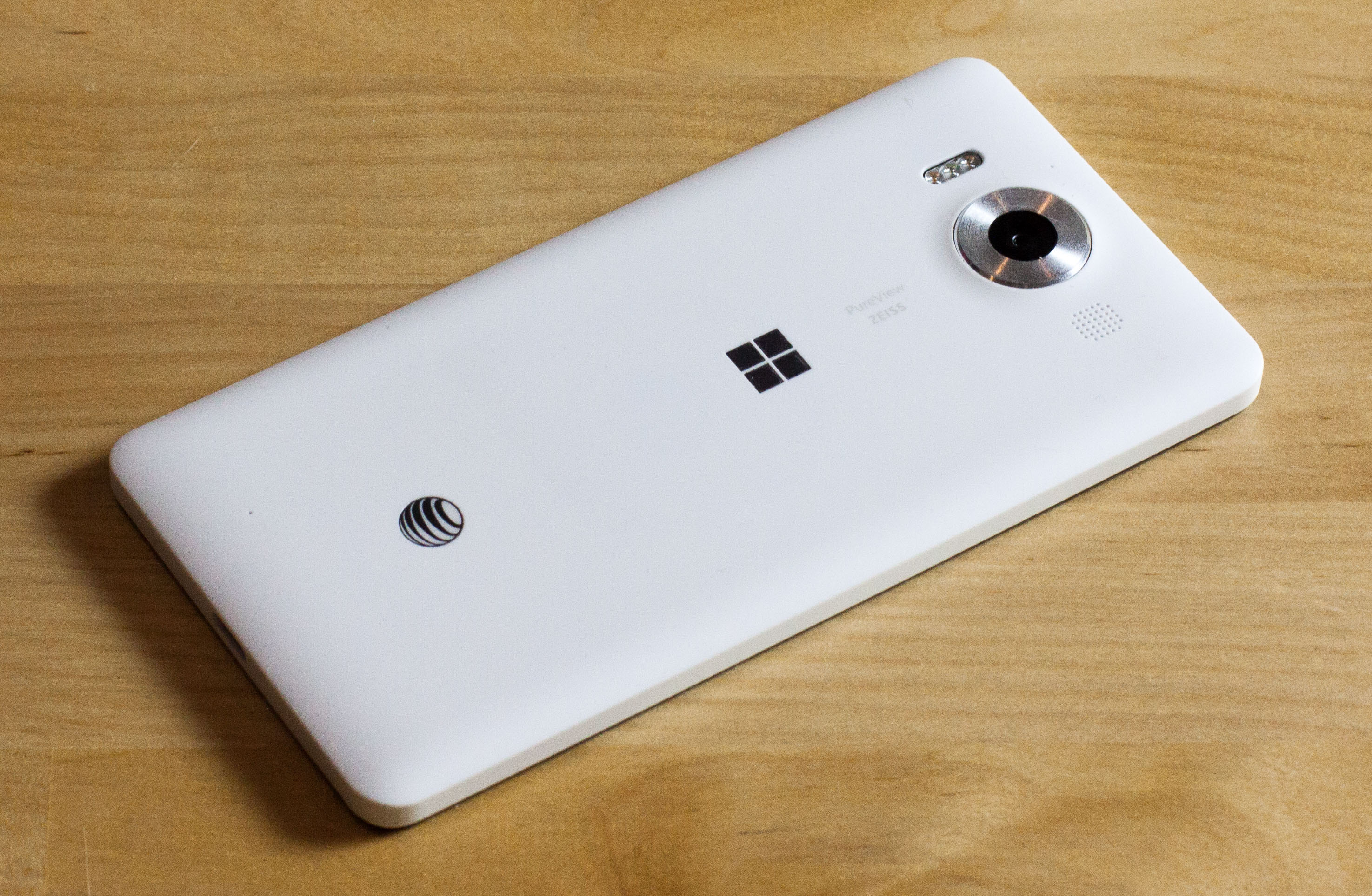 Foto de la parte trasera del Lumia 950.